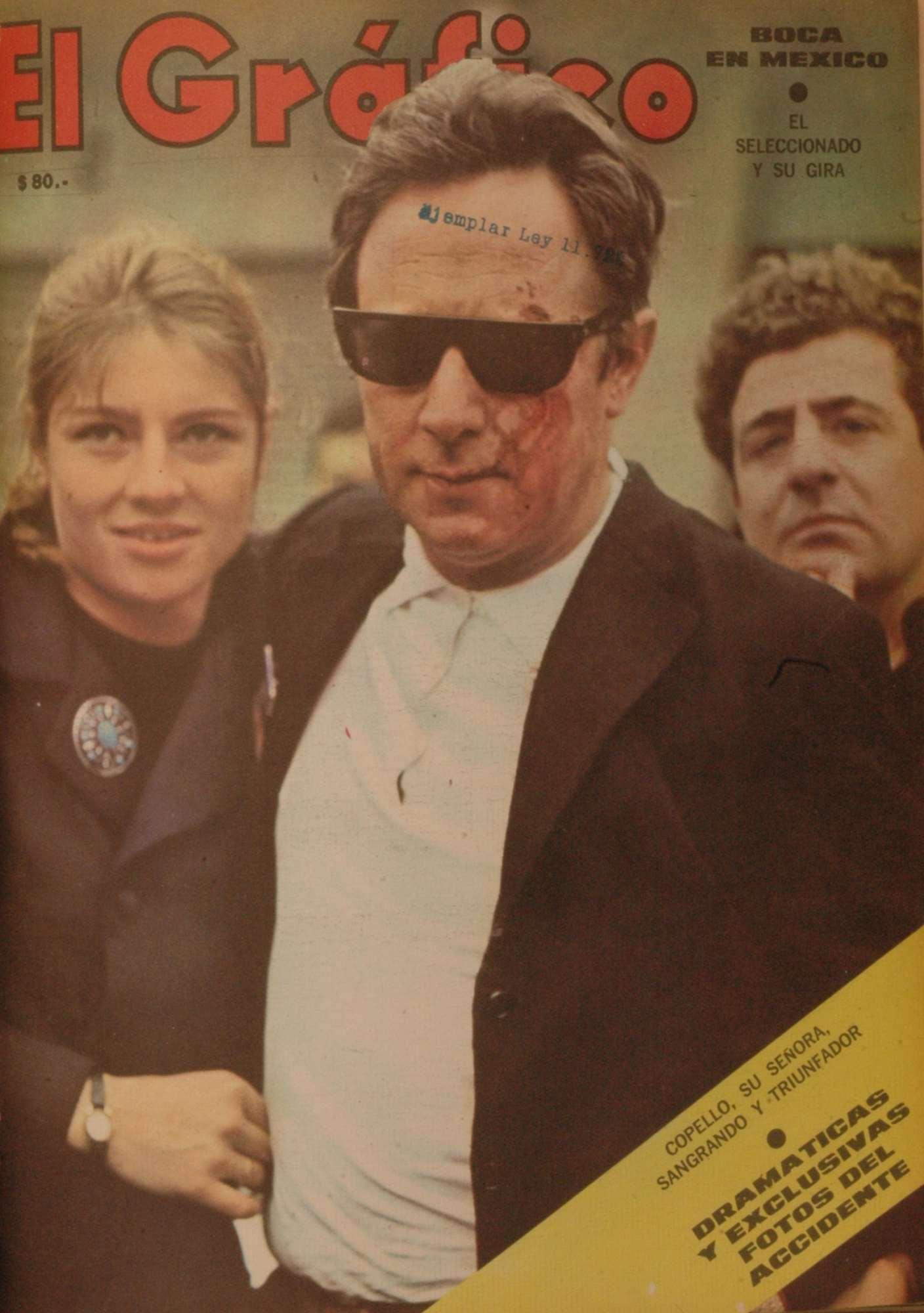 El Grafico del 22 de Agosto de 1967. Edicion 2498